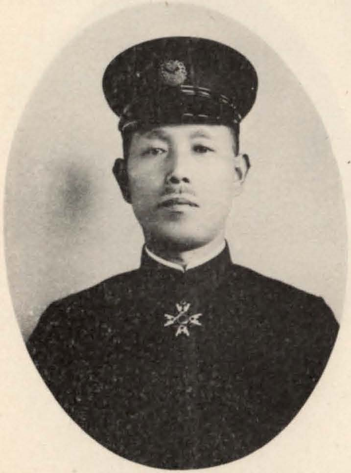 Bân-lâm-gú: 野口敏治 Noguchi Toshiharu